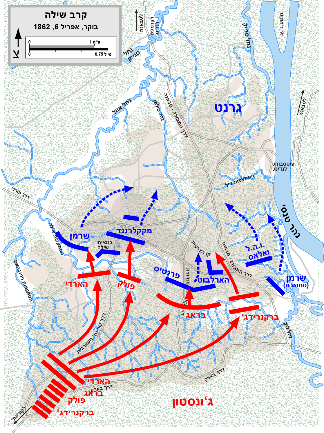 One of a series of three maps of the Battle of Shiloh of the American Civil War. Drawn in Adobe Illustrator CS5 by Hal Jespersen. Graphic source file is available at